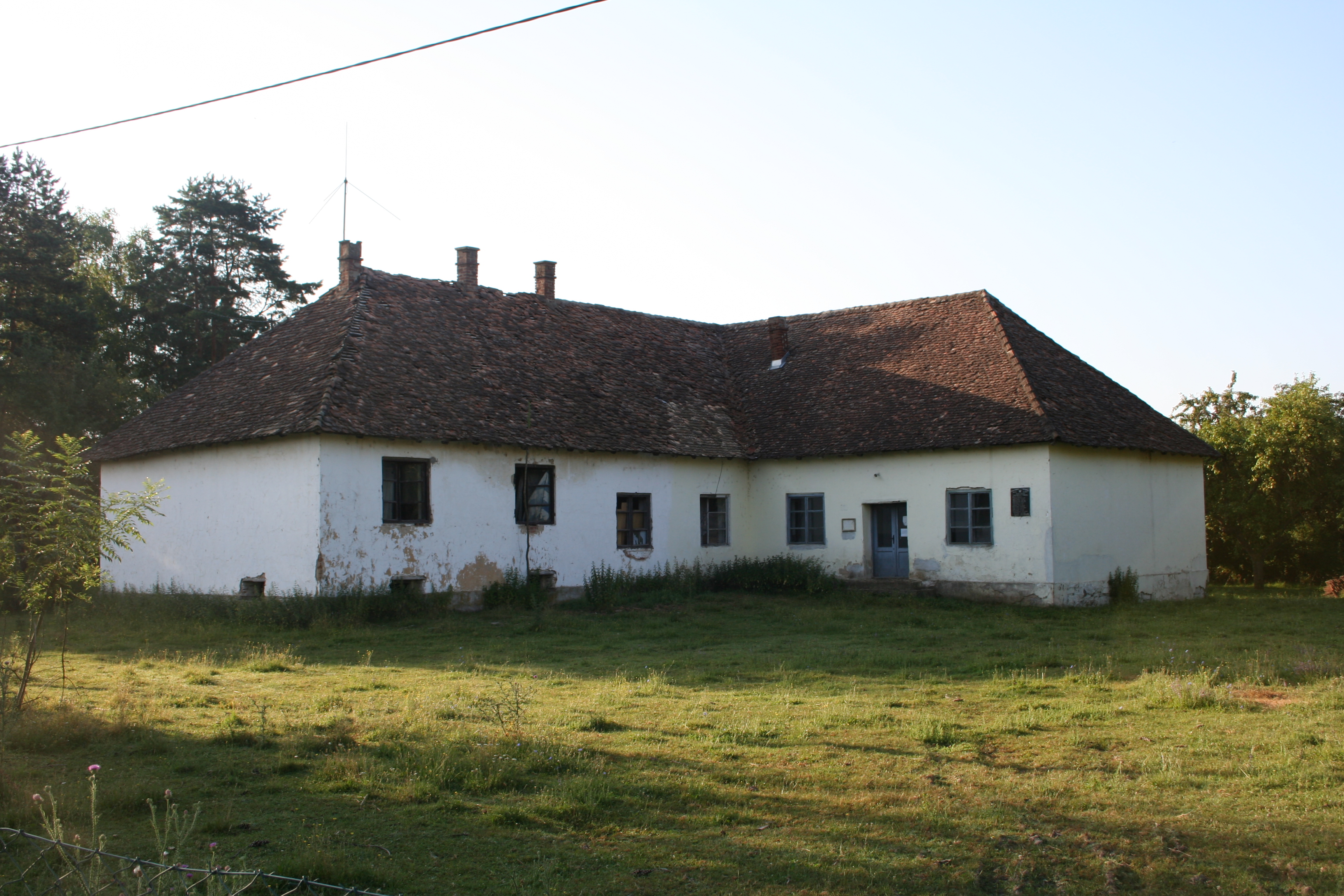 Zgrada nekadašnje škole i MZ, Subotica (Koceljeva)